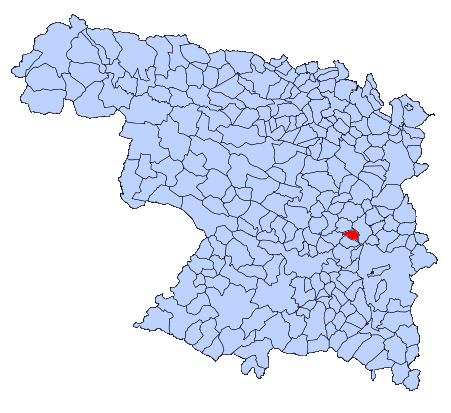 Mapa de Gallegos del Pan, en Zamora